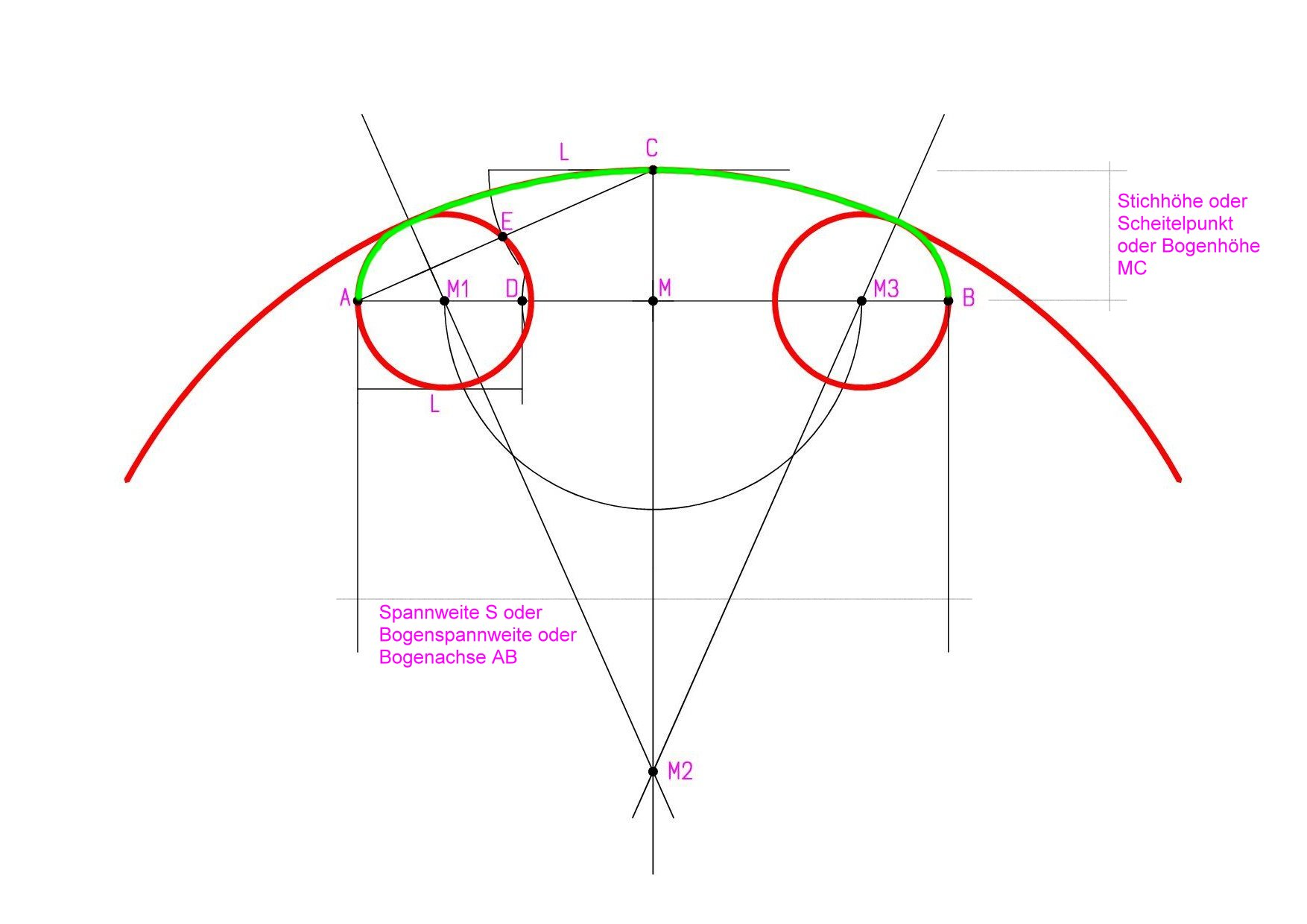 Konstruktion eines Korbbogens aus drei Mittelpunkten (M1, M2, M3).